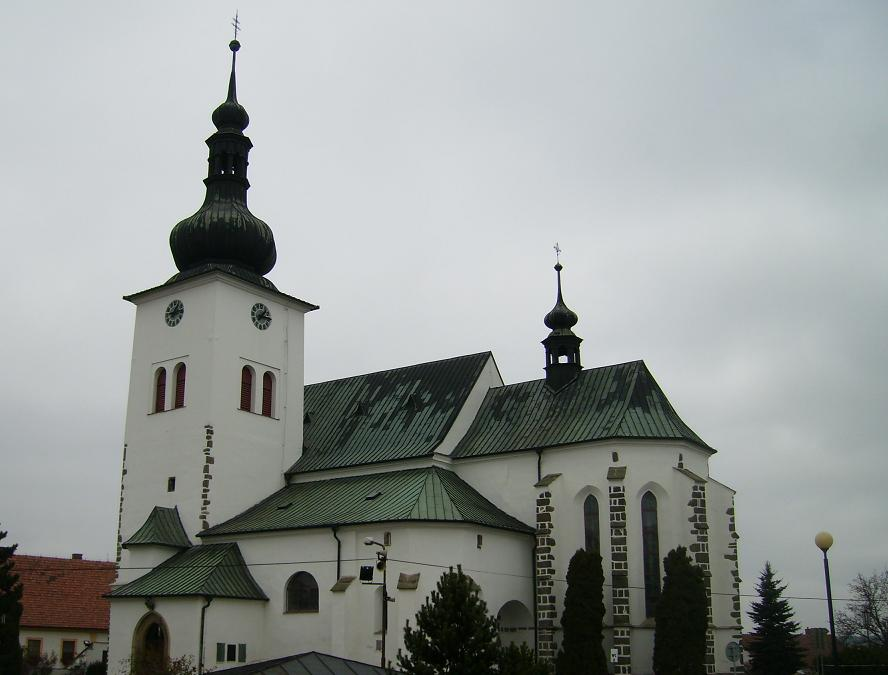 Kostel sv. Václava v Křižanově na Moravě